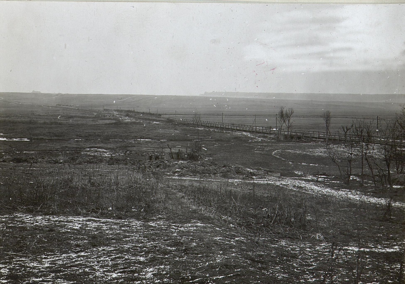 Lipa-Brücke Boroczyce